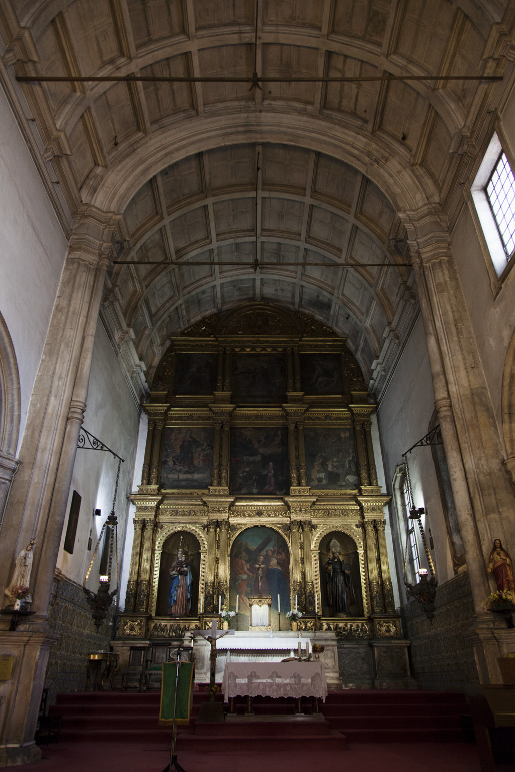 Diogo de Castilho, Igreja da Graça, Coimbra